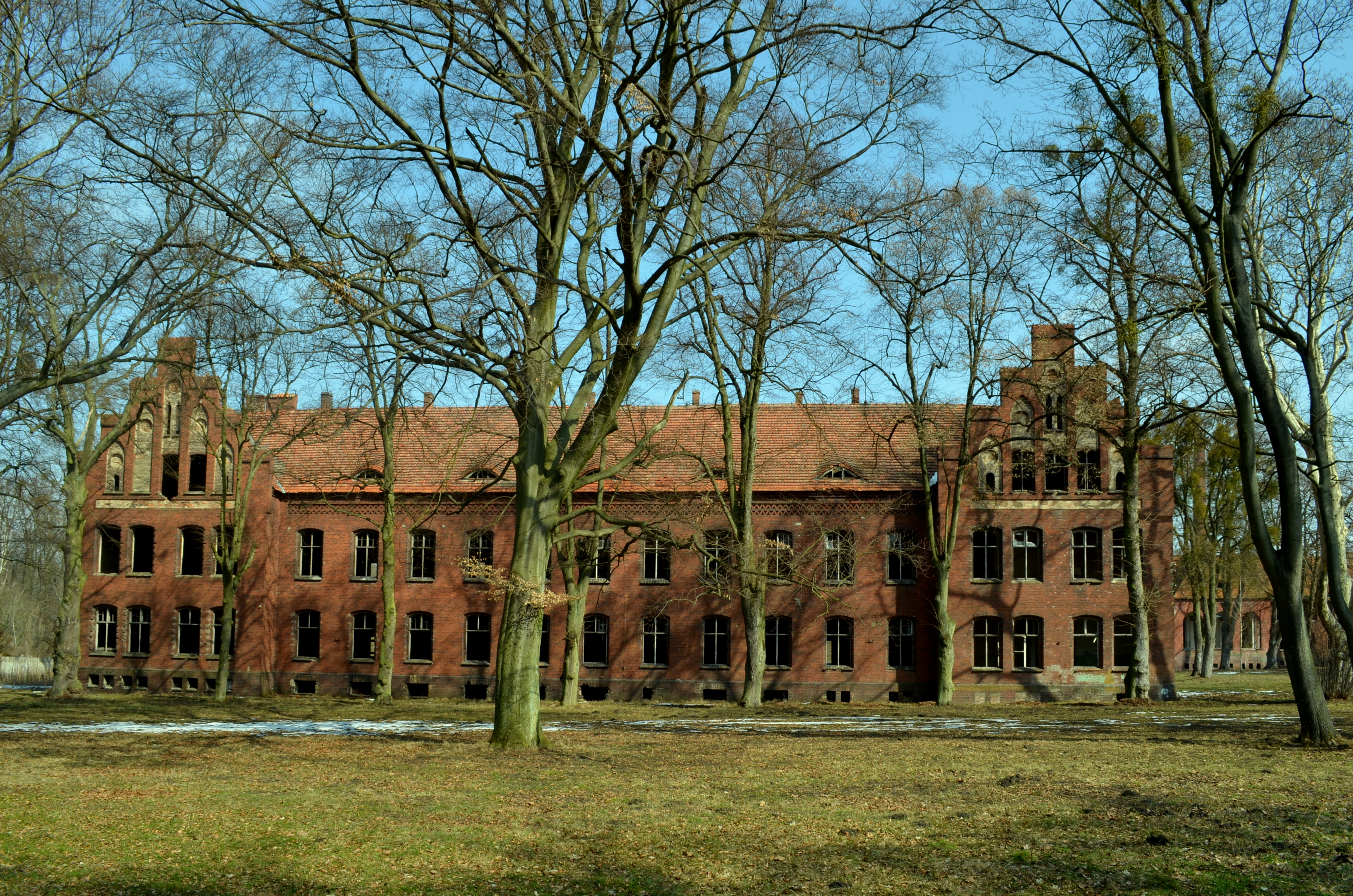 Owińska, pawilon I, 2 poł. XIX